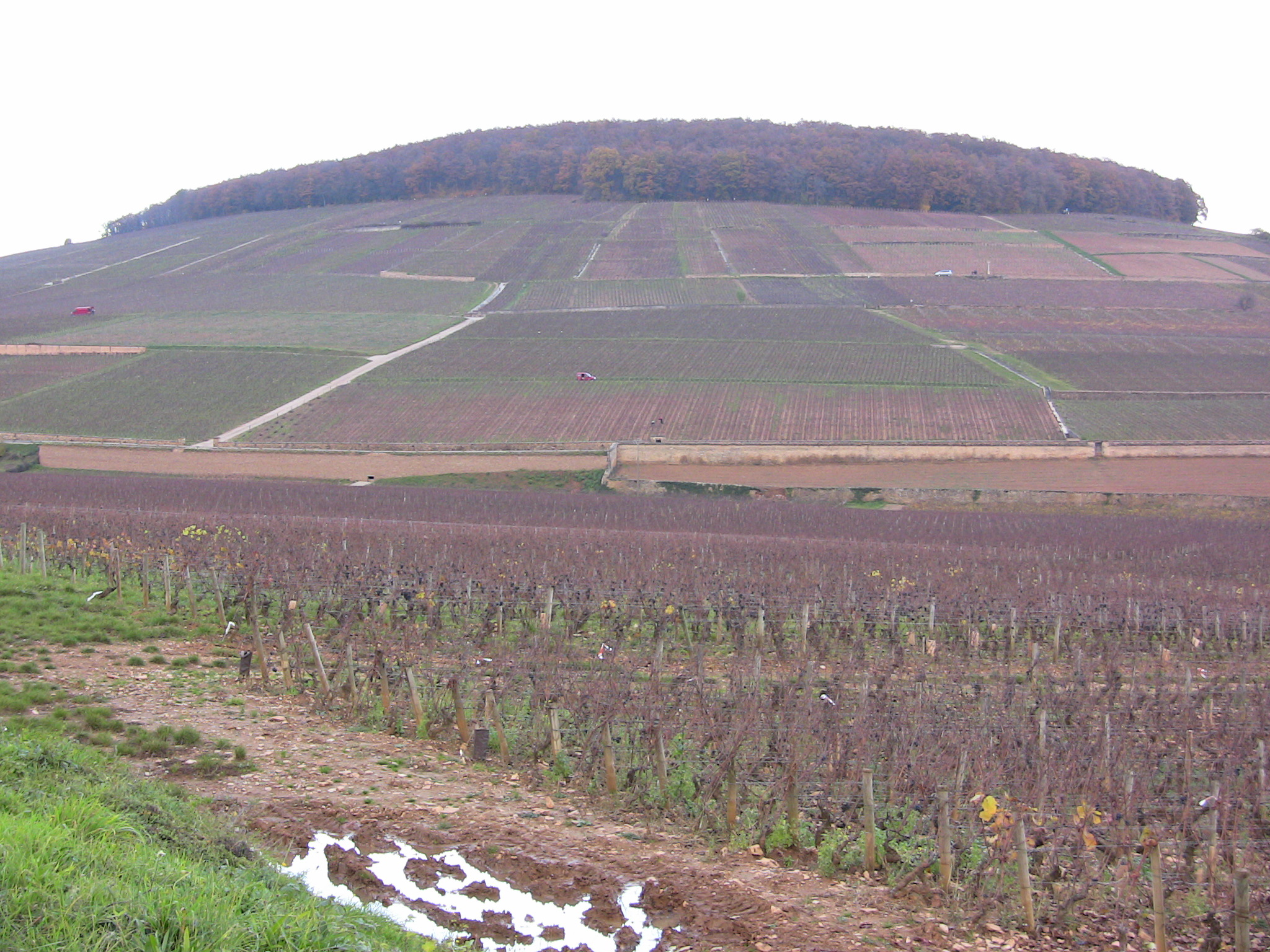 Burgundy wine Region, France November 13, 2008